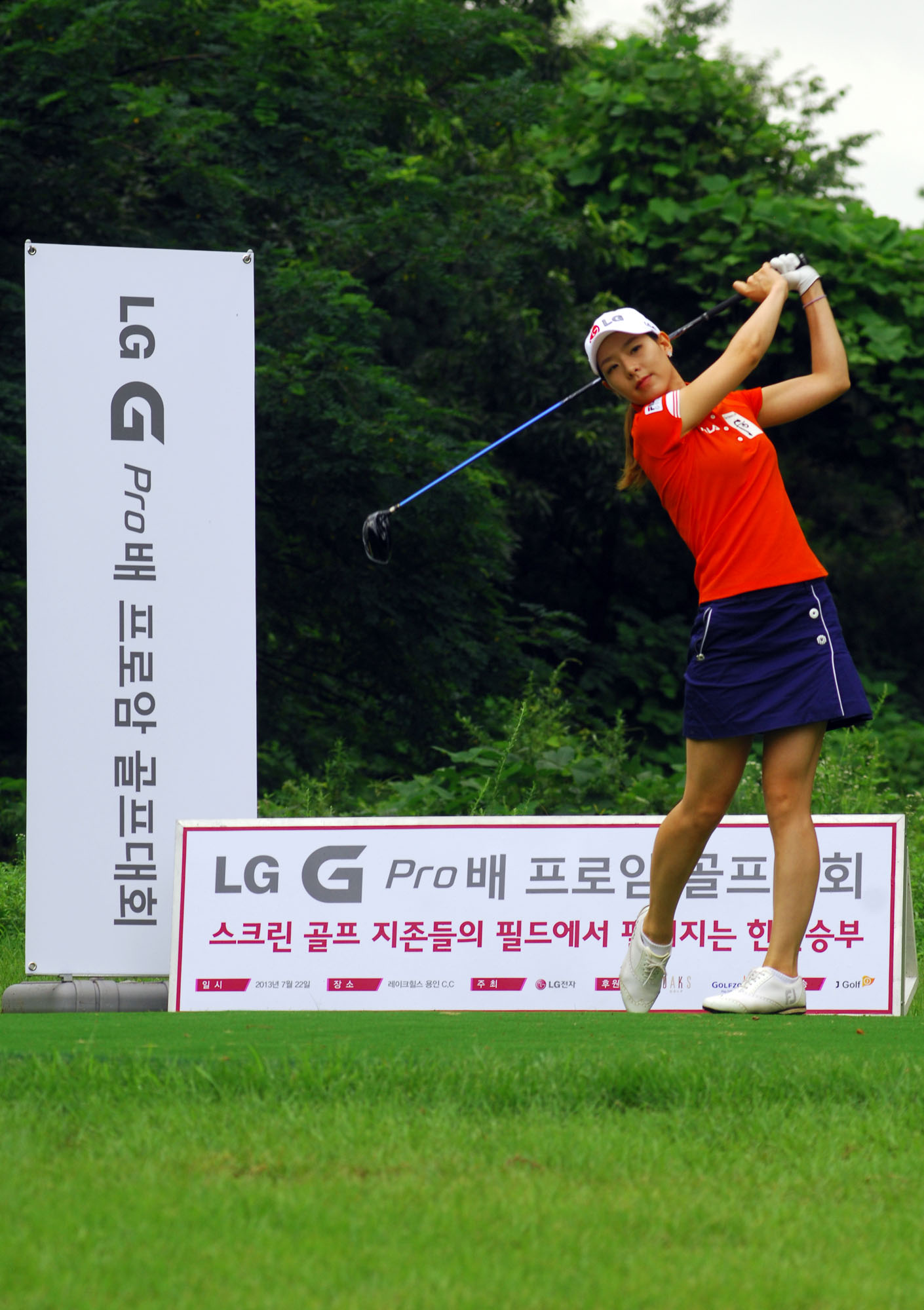 LG전자 ‘G Pro배 골프대회’ 결승전 개최